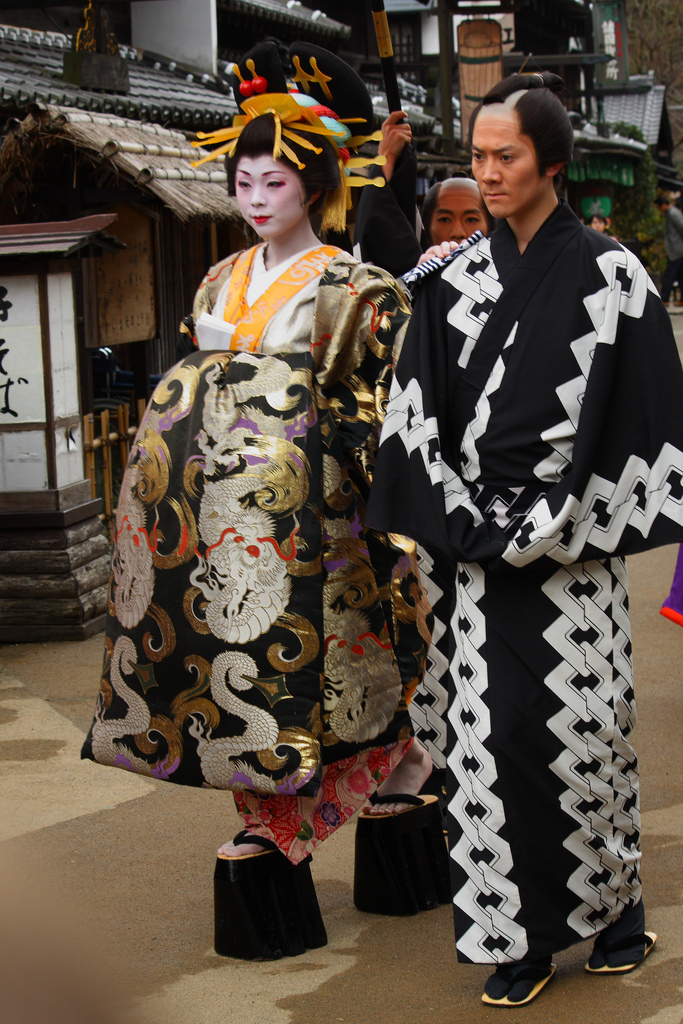 Edo Wonderland, Nikko